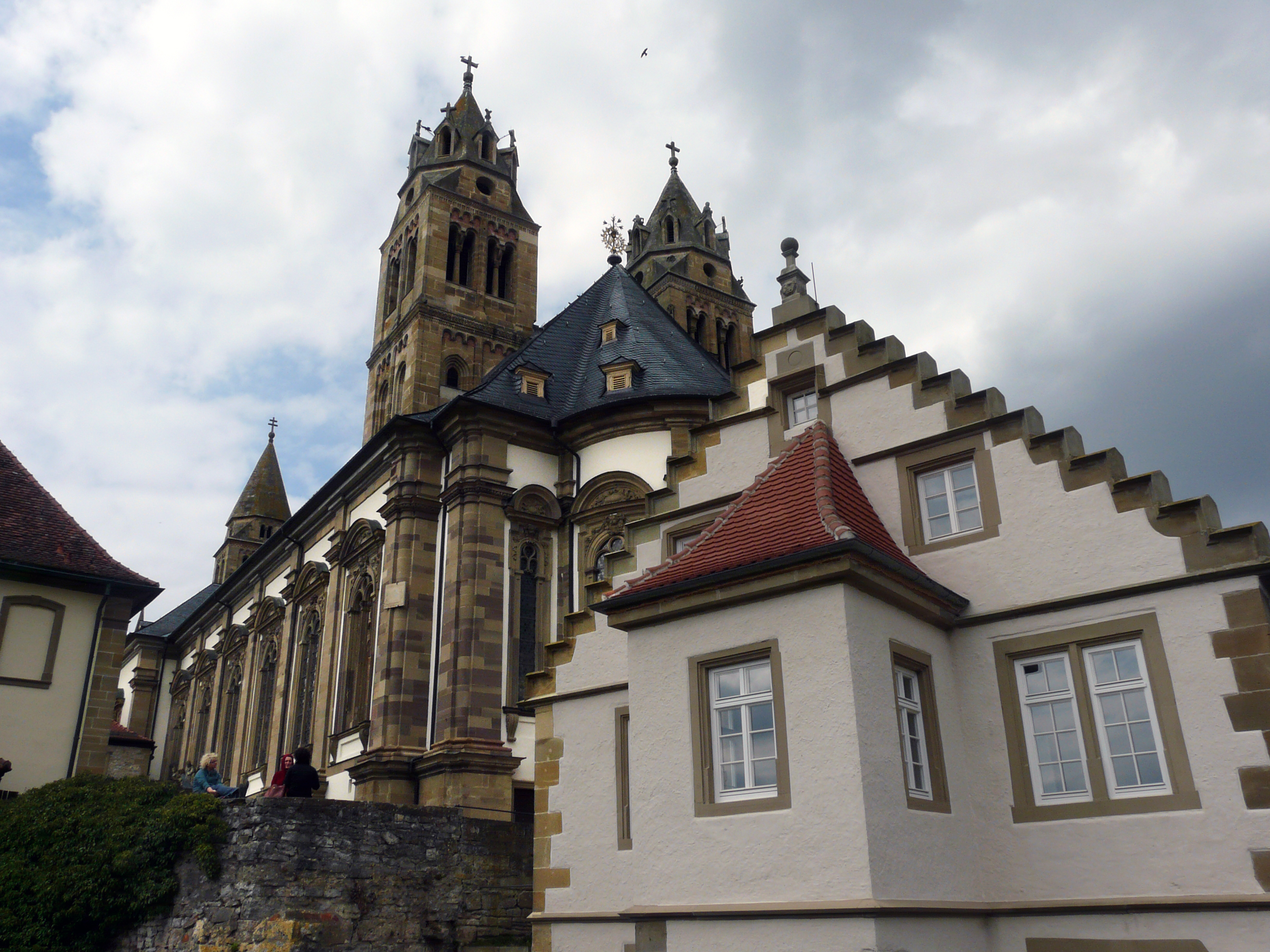 Церковь Св. Николая